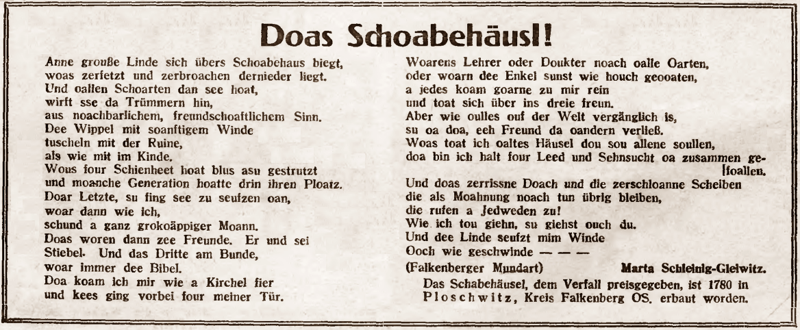 Das Schabehäusel! (Falkenberger Mundart).